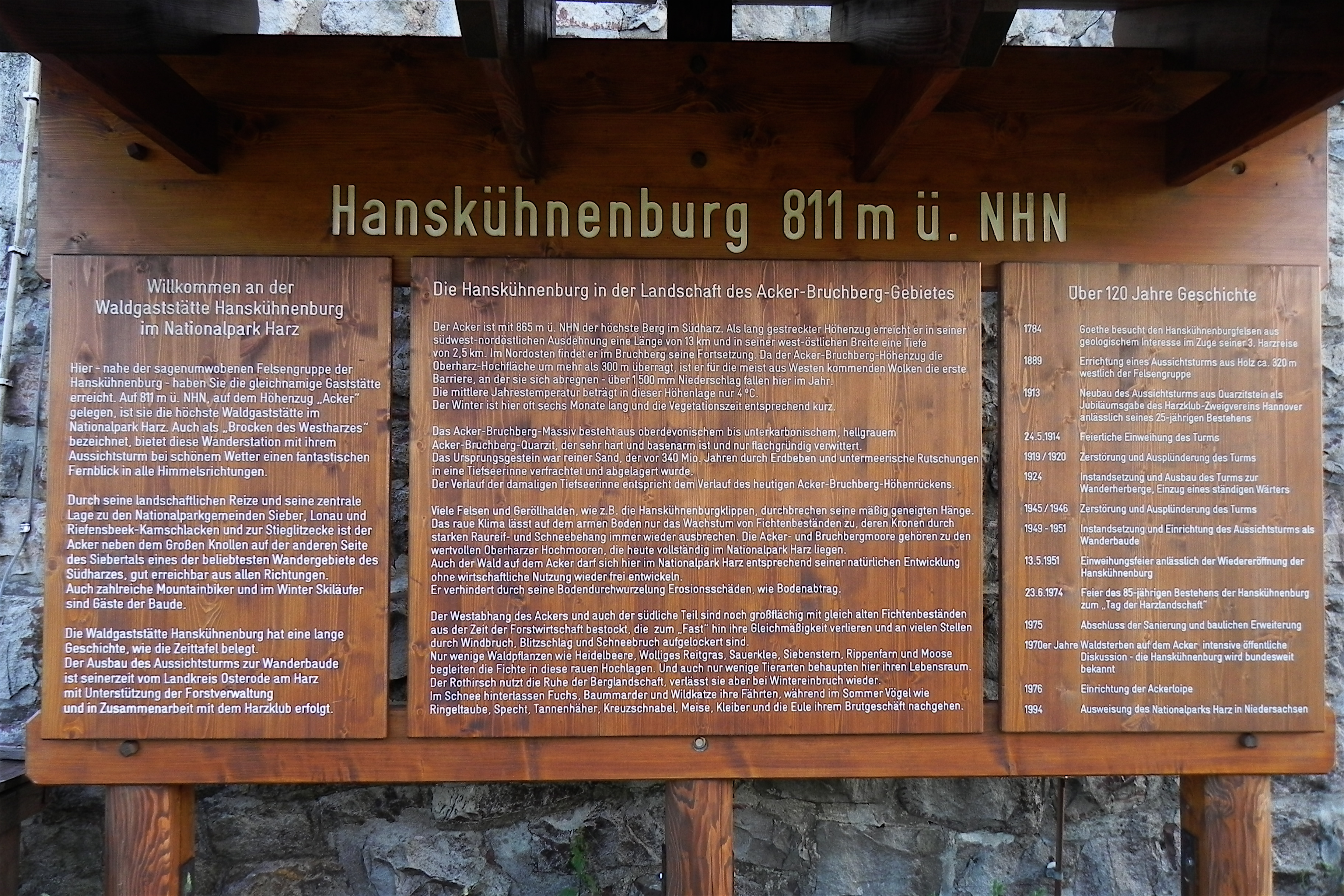 Neue Hinweistafel an der Hanskühnenburg